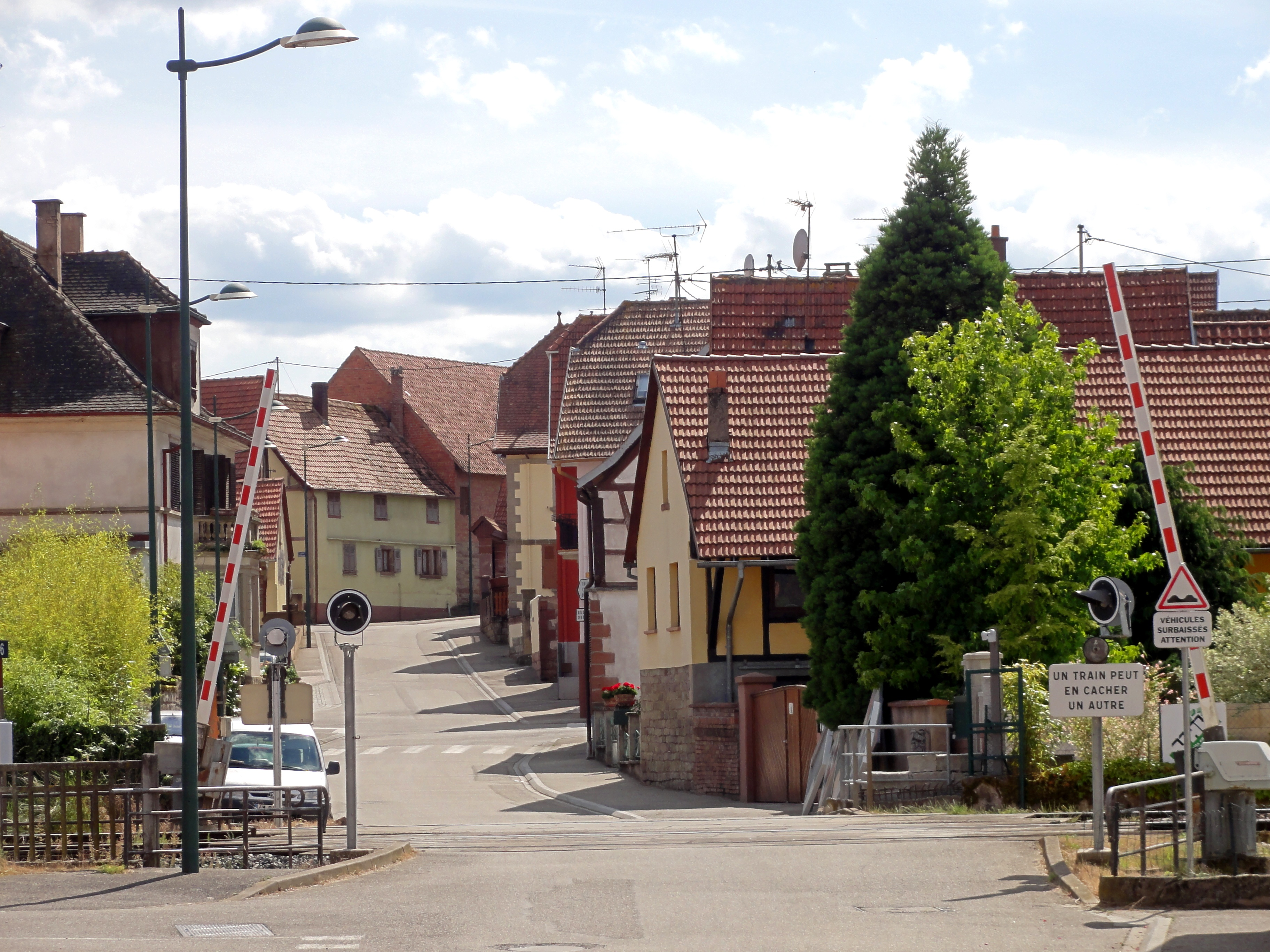 Alsace, Bas-Rhin, Ettendorf, Rue Principale.